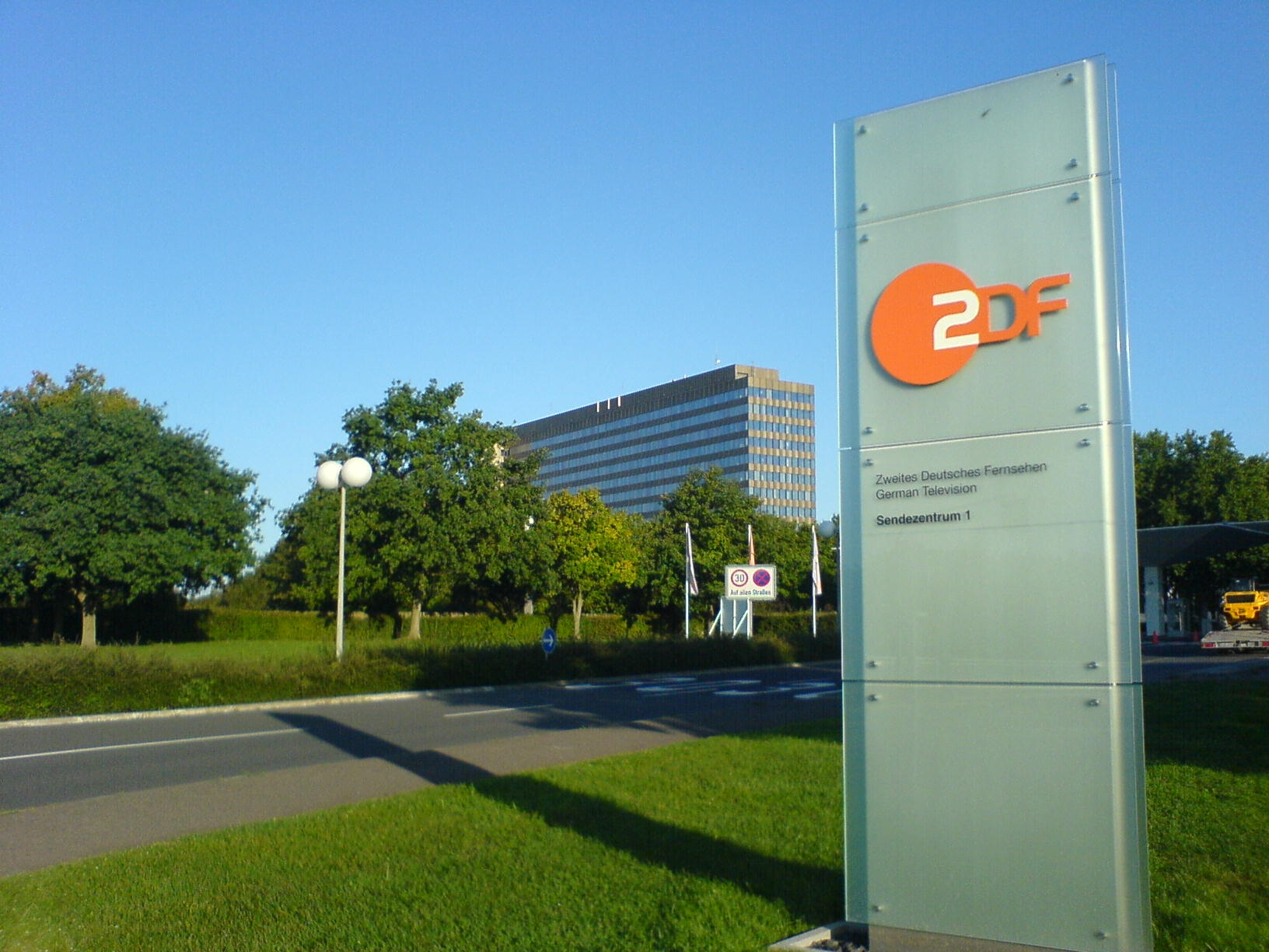 Sendezentrum I des ZDFs in Mainz